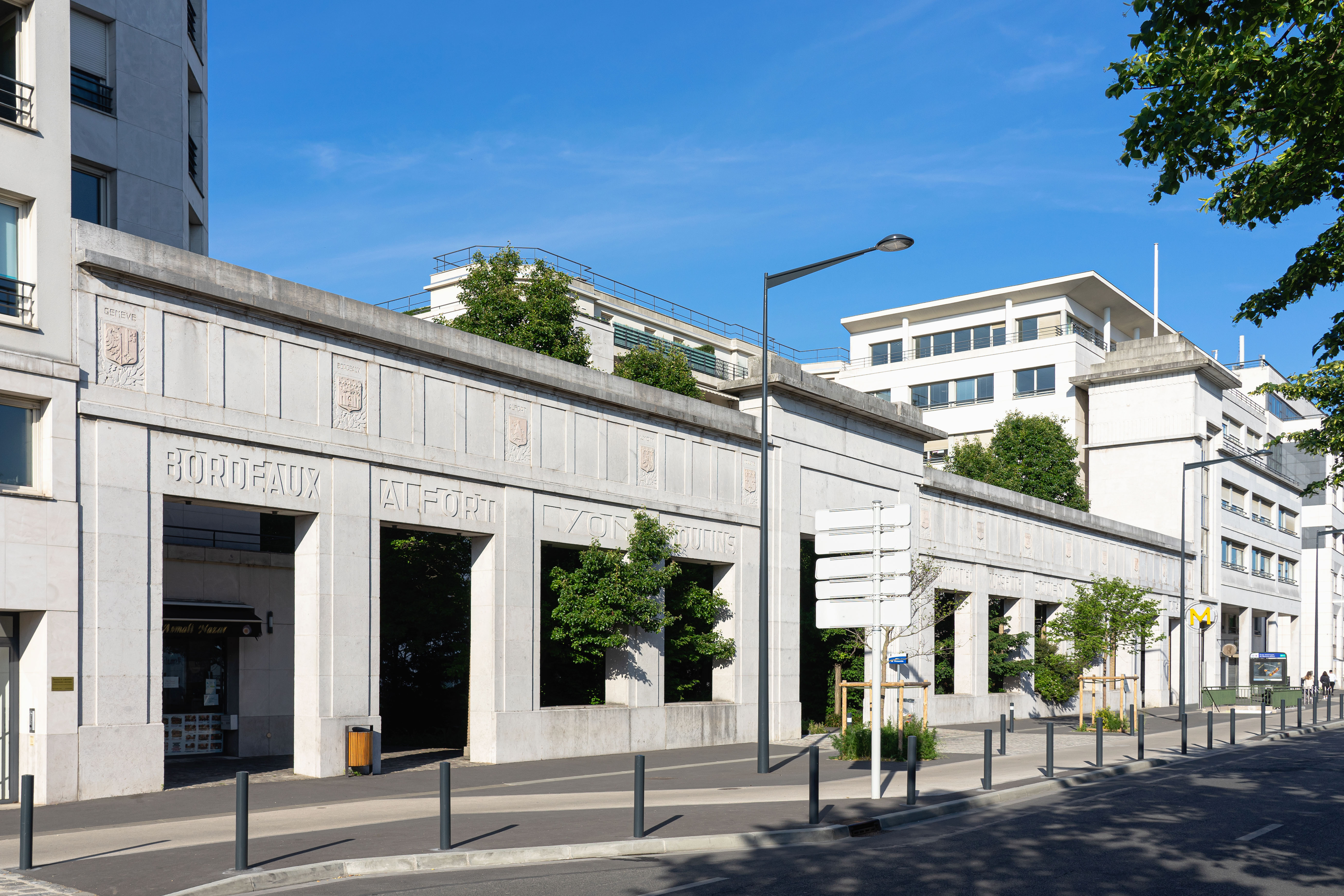 Dernière empreinte de l'usine de la Suze de Maisons-Alfort, cette façade de l'architecte Paul Fenard (1935) est inscrite à l'Inventaire Supplémentaire des Monuments Historiques en 1993